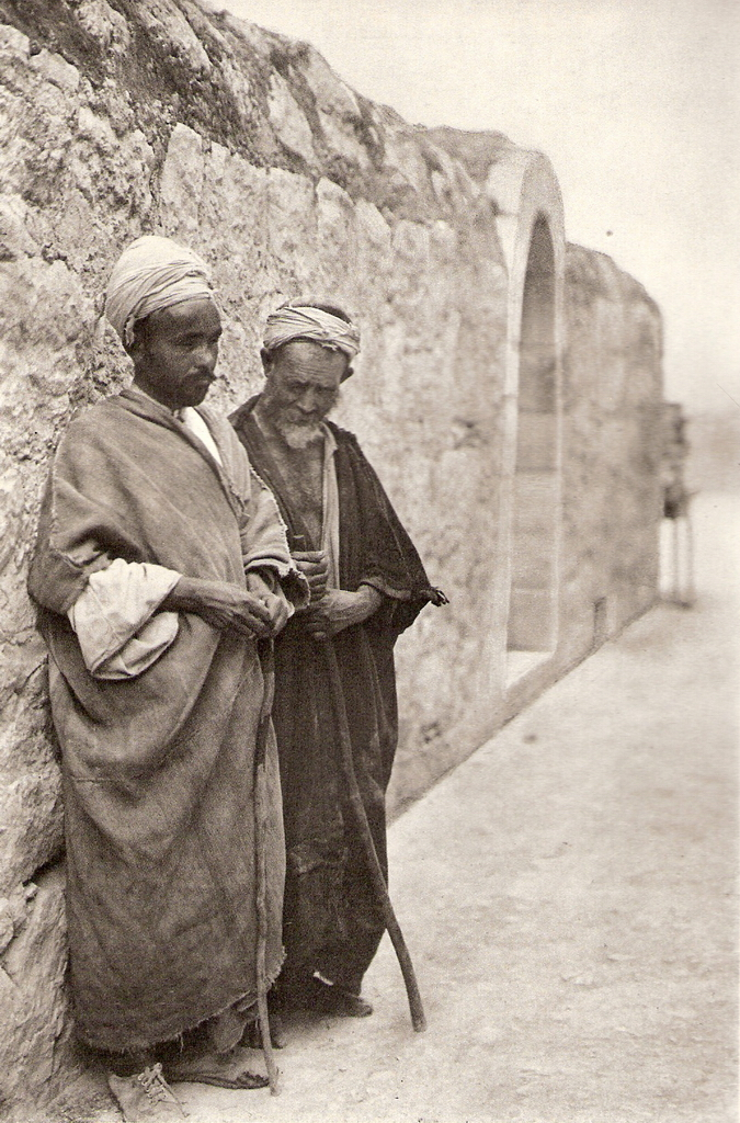 זוג קבצנים עיוורים ברחוב בhe:בית לחם בשנת 1925 לערך.